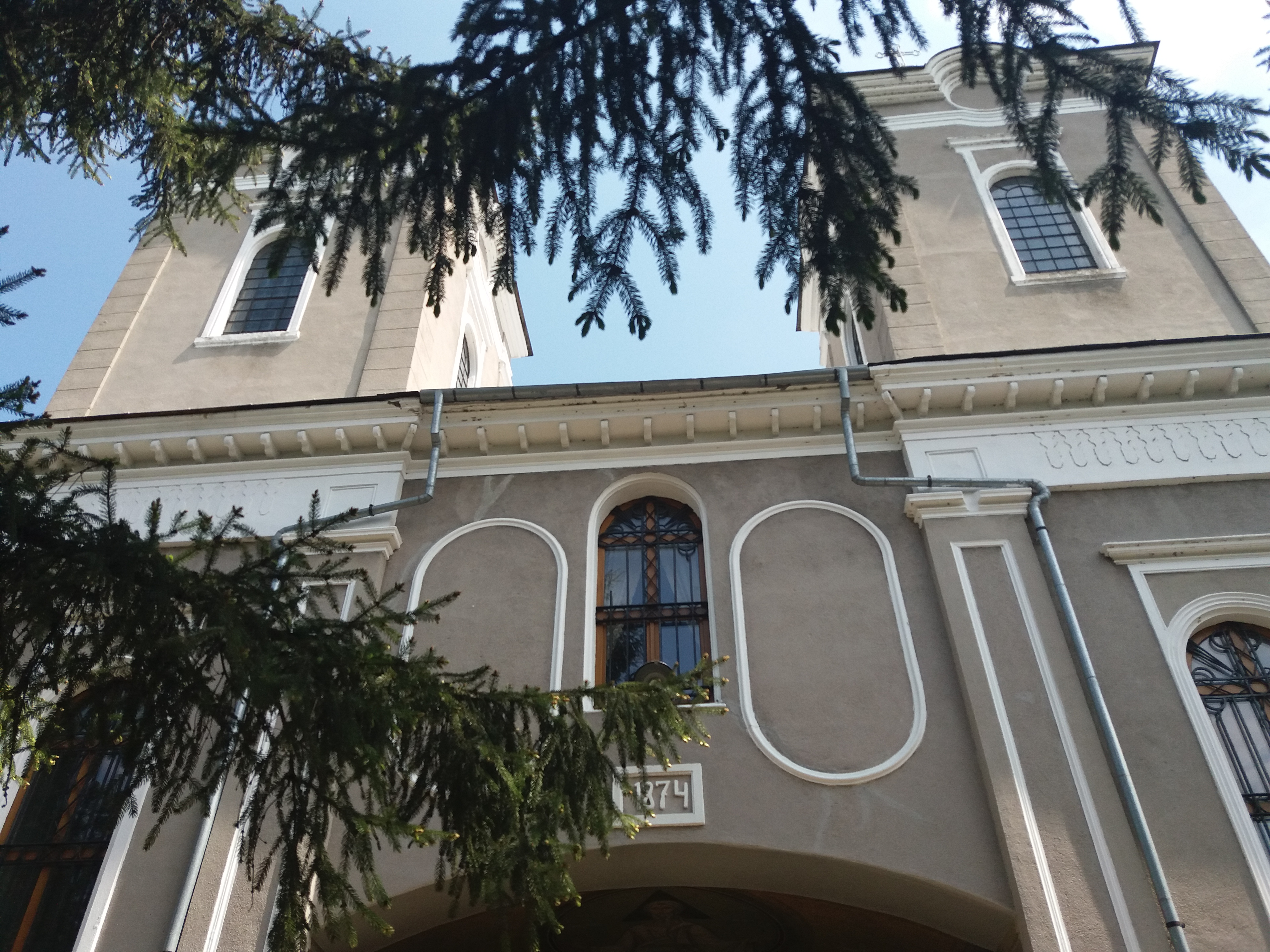 Biserica Izvorul Tămăduirii din Calafat